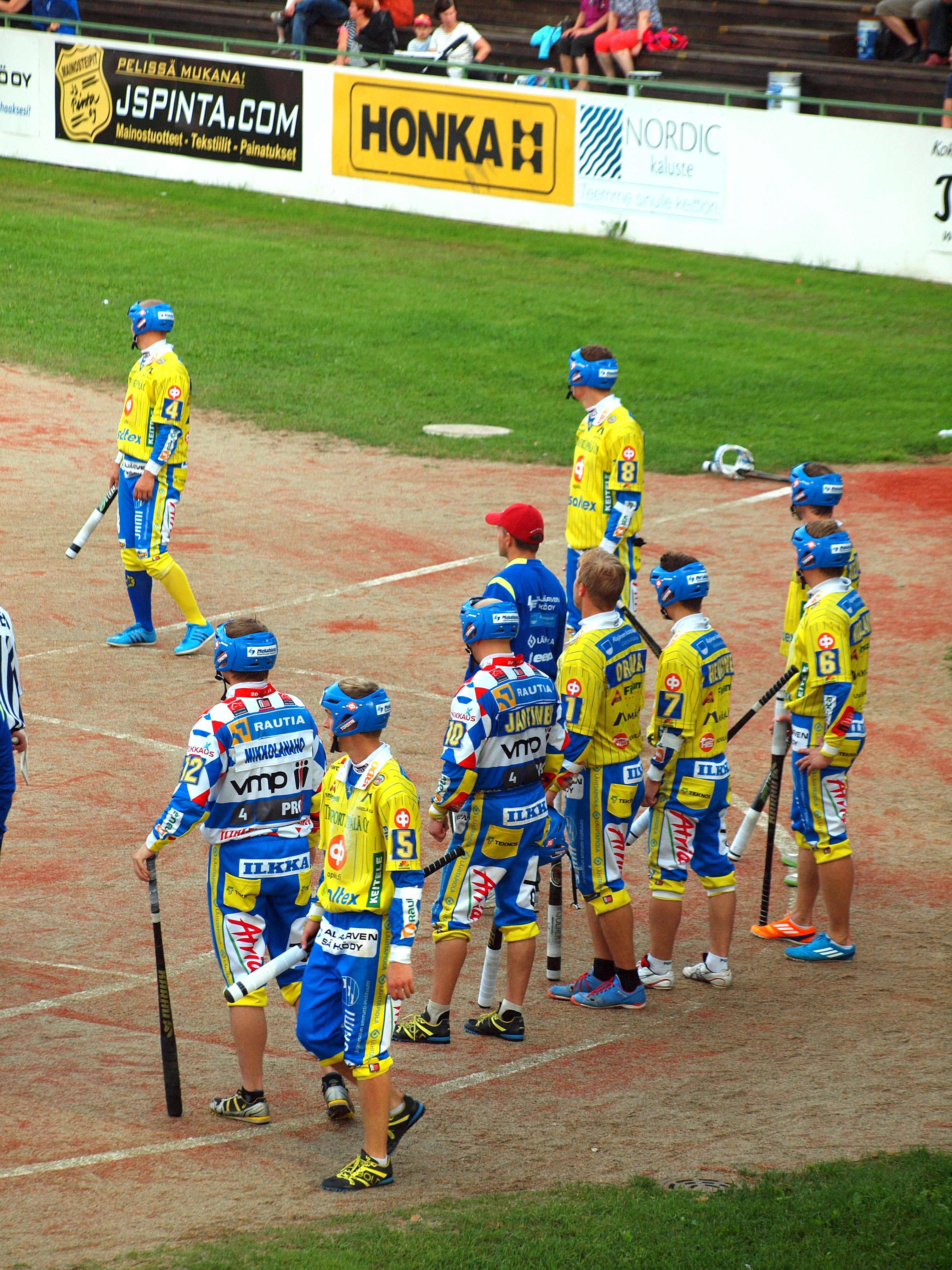 Alajärven Ankkurit - Vimpelin Veto pesäpallo-ottelu 10.8.2014.